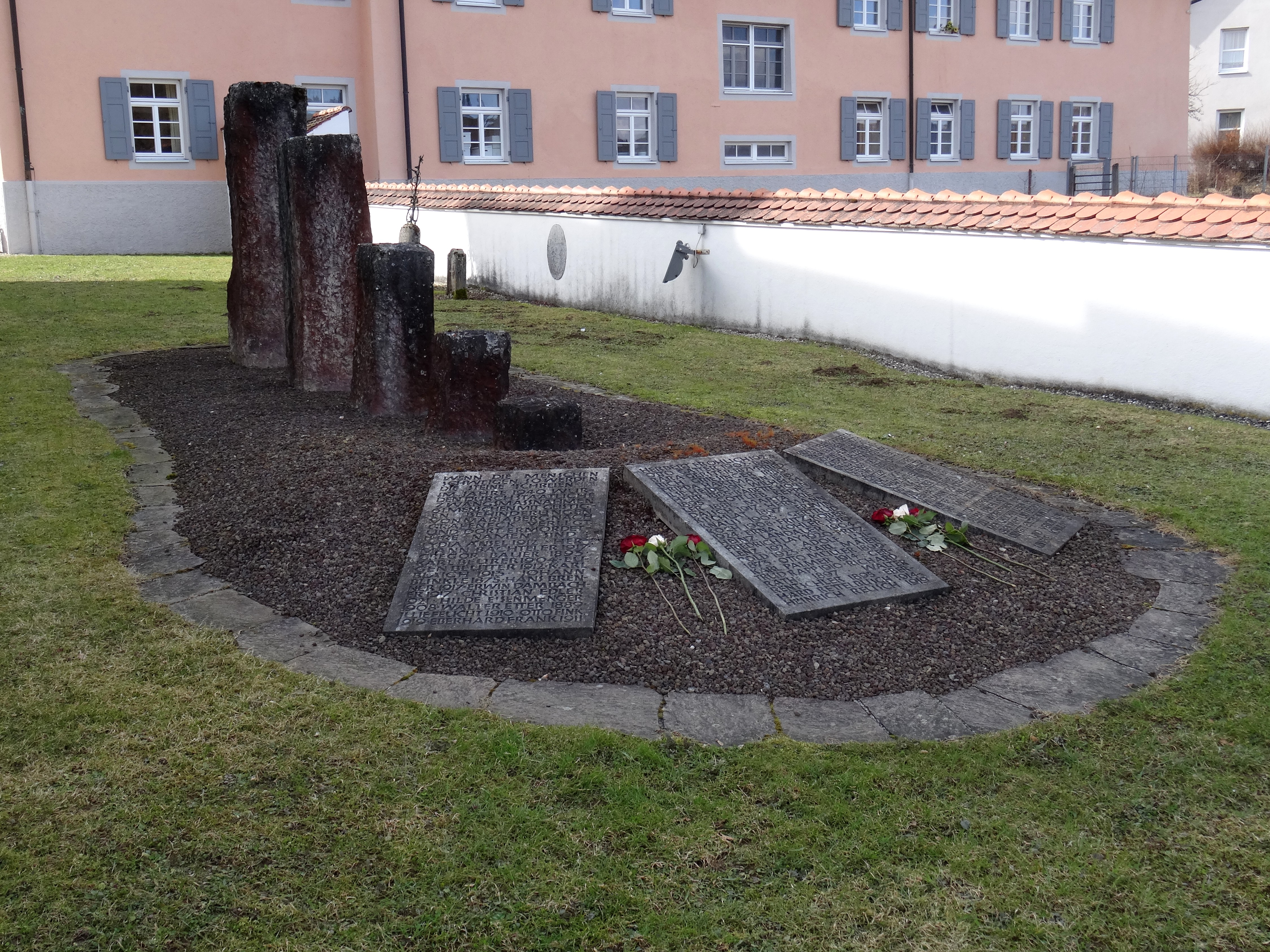 Wenn die Menschen schweigen, so werden die Steine schreien. Mahnmal für die 61 Frauen und Männer aus Mariaberg, die 1940 nach Grafeneck verlegt und dort ermordet wurden.